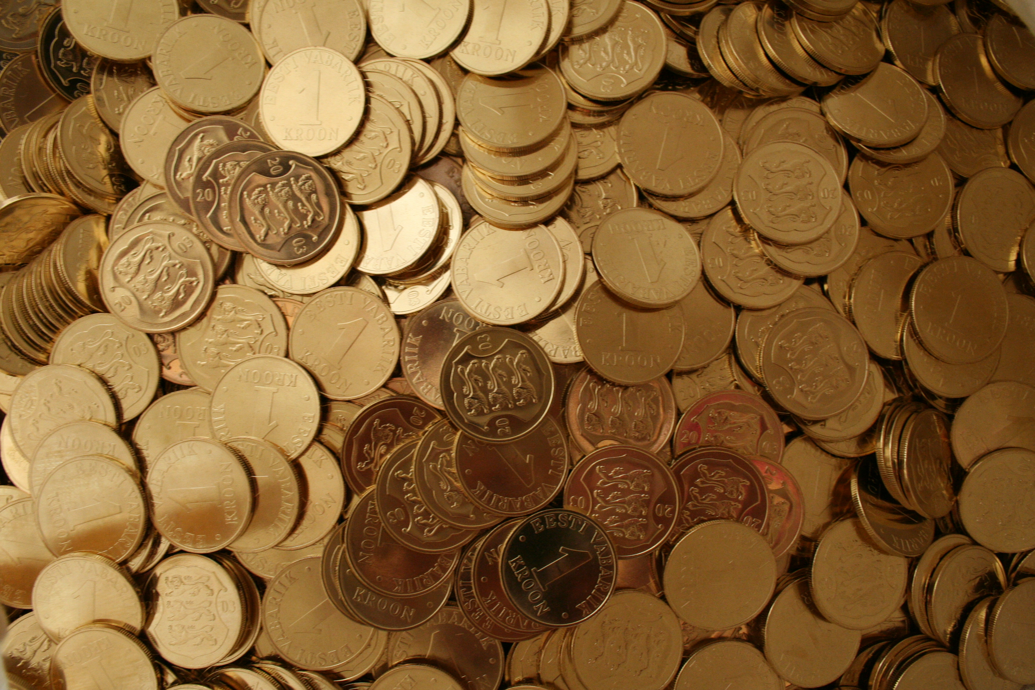 Estonian krones